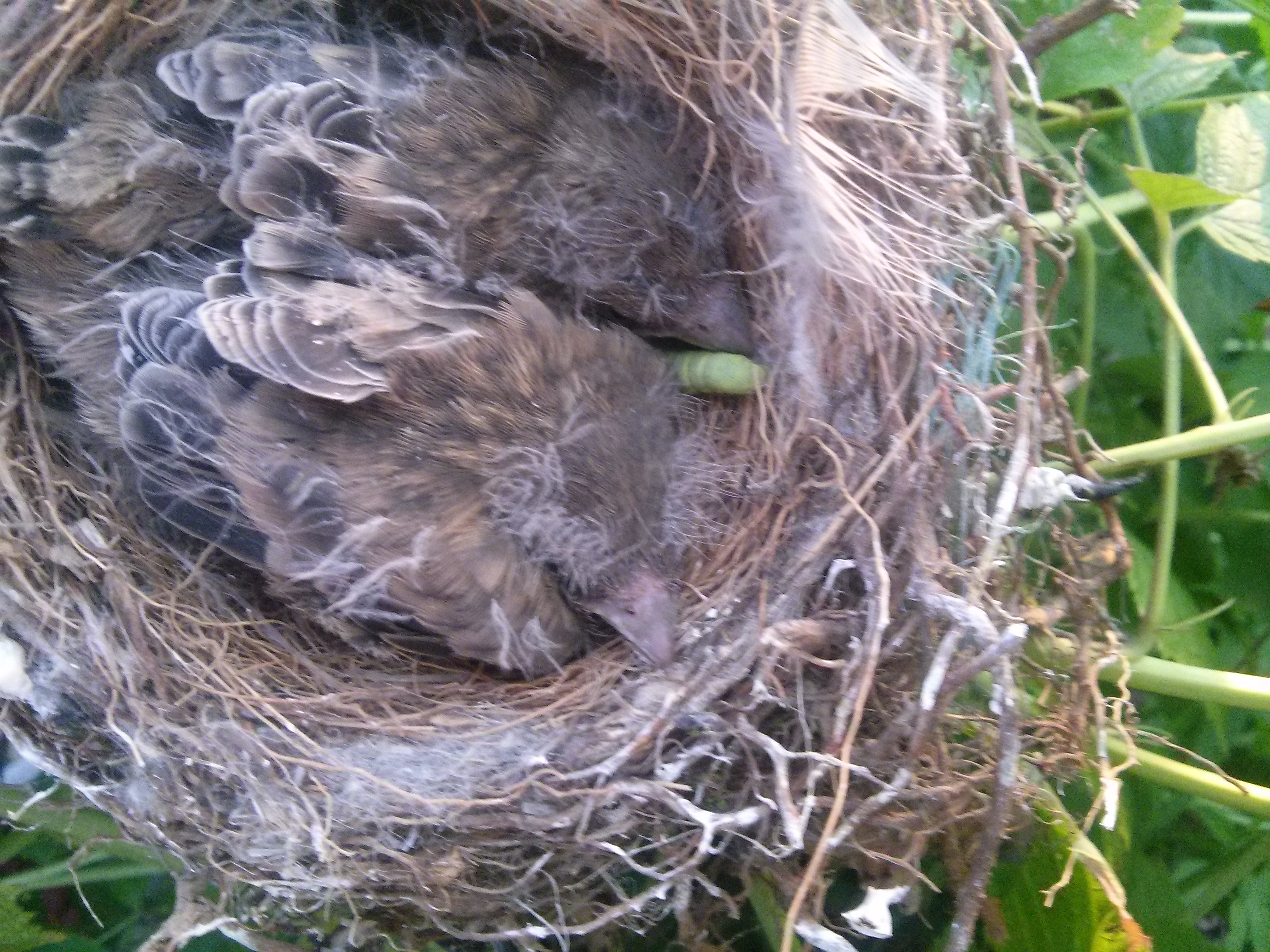 Српски (ћирилица): Младунци домаћег врапца